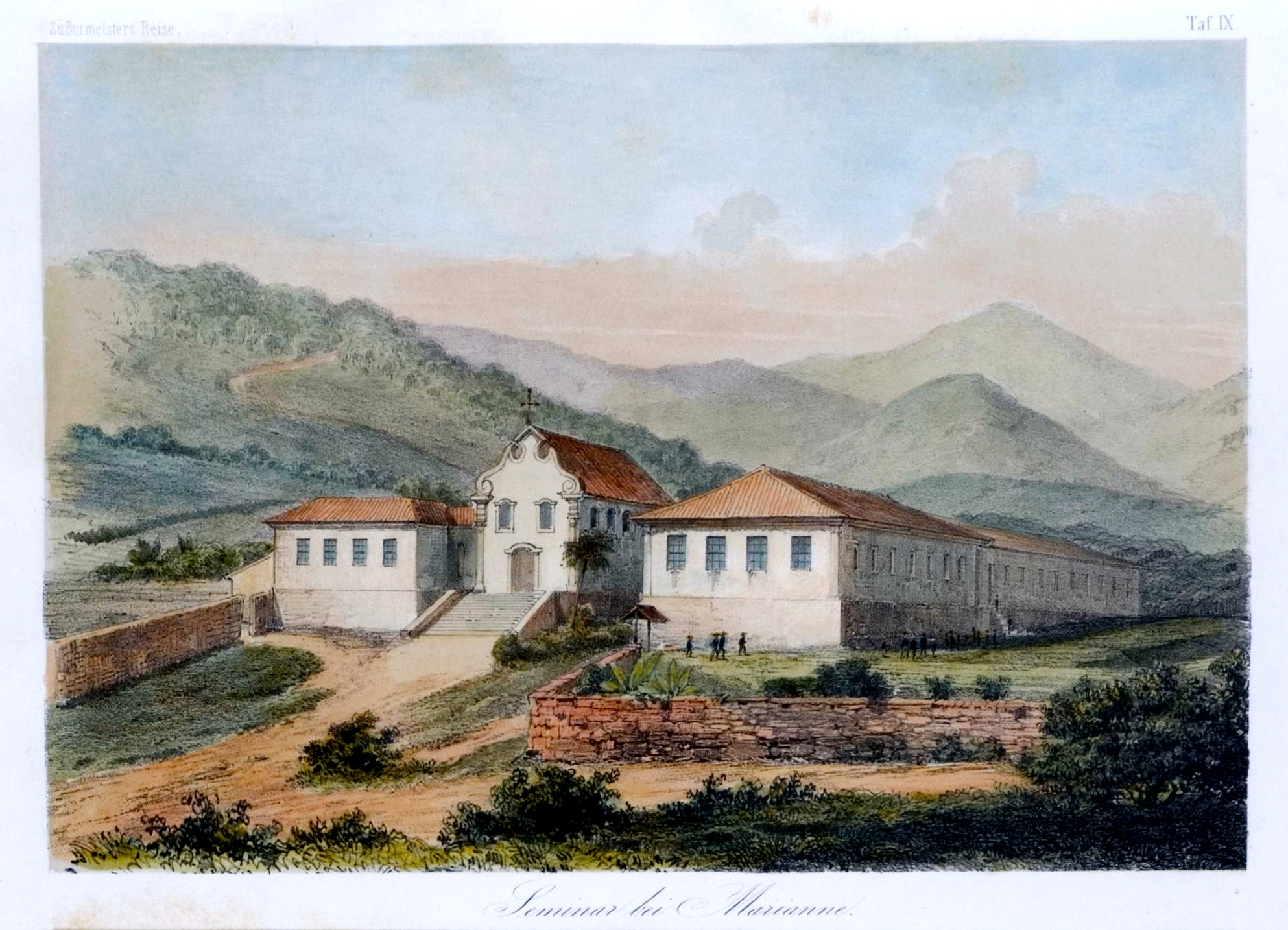 Imagem pertence ao livro: BURMEISTER, Hermann. Landschaftliche Bilder Brasiliens und Portraits einiger Urvoelker; als Atlas zu seiner Reise durch die Provinzen von Rio de Janeiro und Minas Geraes entworfen und herausgegeben von Dr. Herm Burmeister. Berlin: Verlag von Georg Reimer, 1853. ( (No shot settings)